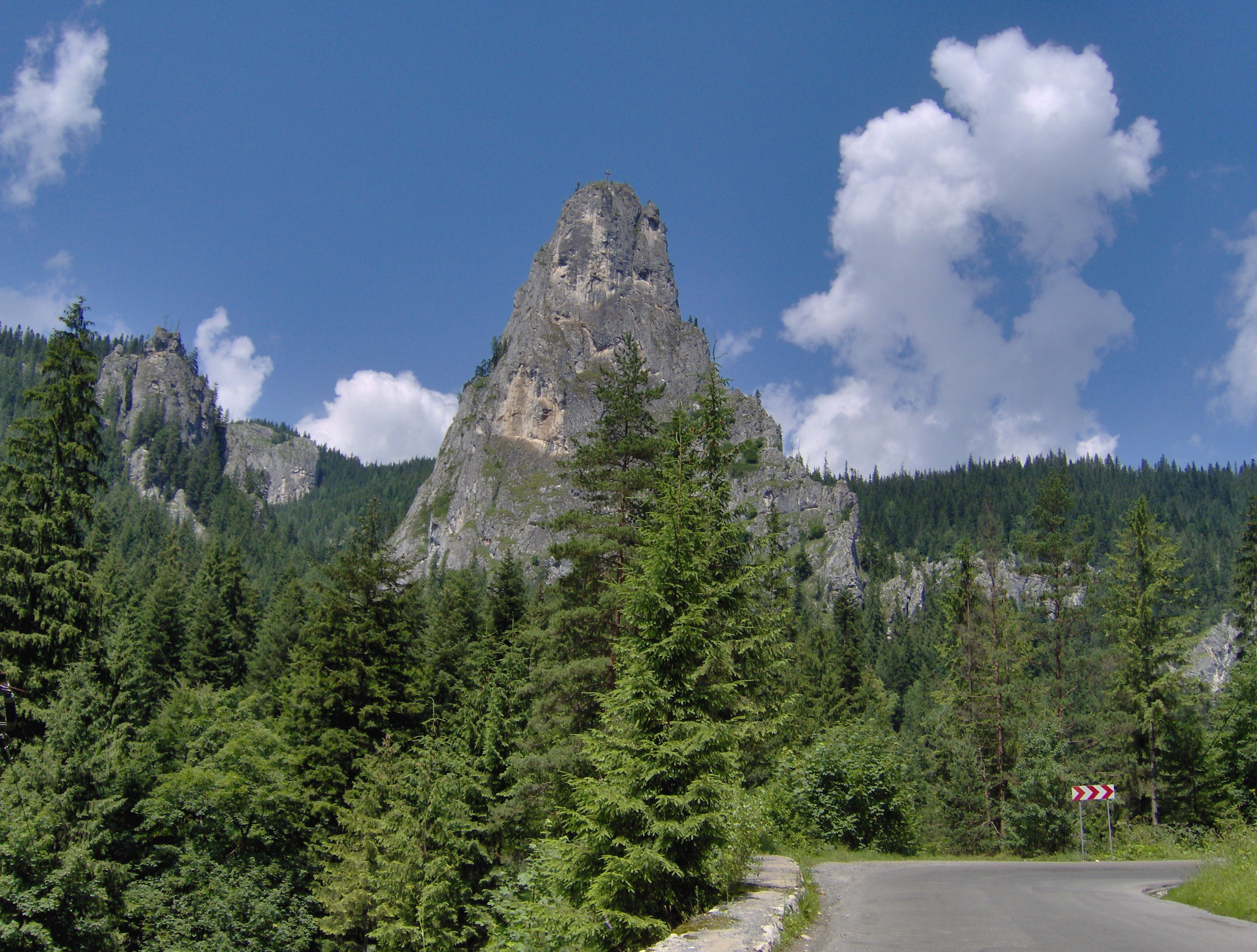 Cheile Bicazului, 2006